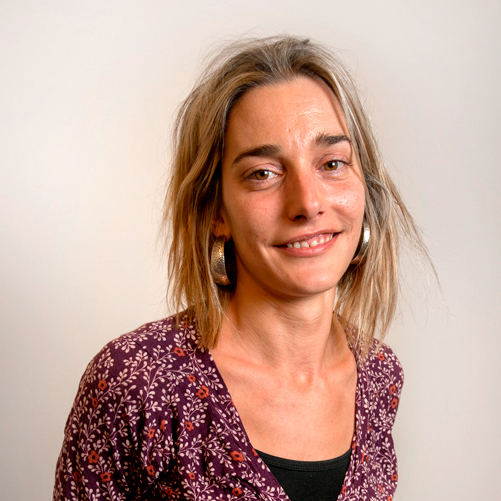 Miren Zabaleta